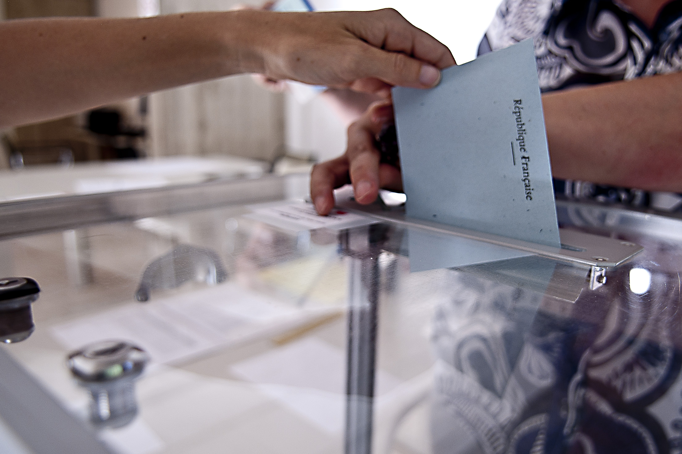 Brasília - franceses que vivem no Brasil vão à embaixada para votar na eleição presidencial da França.